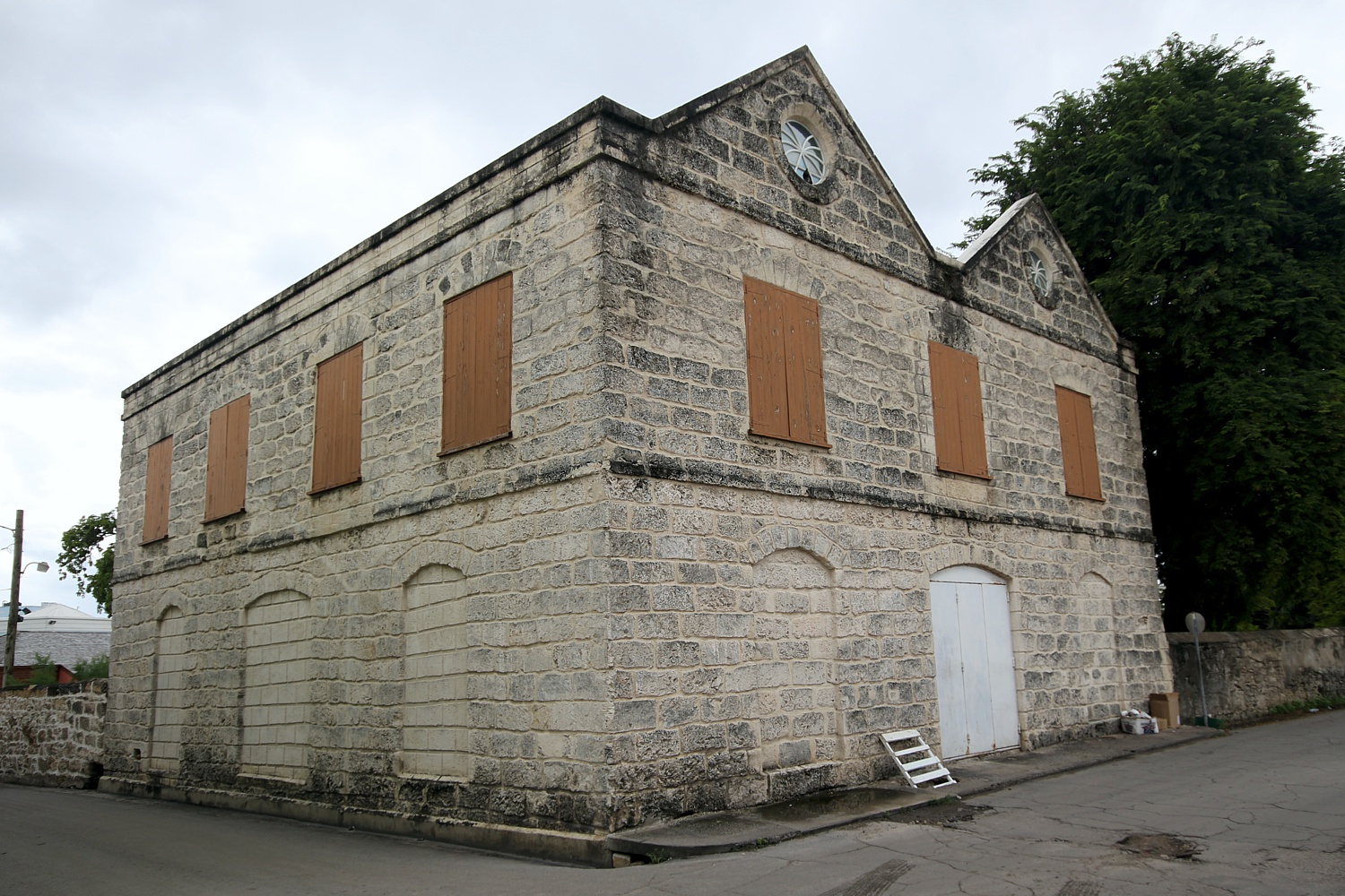 Das Nidhe Israel Museum auf dem Gelände der Synagoge von Bridgetown (Barbados)